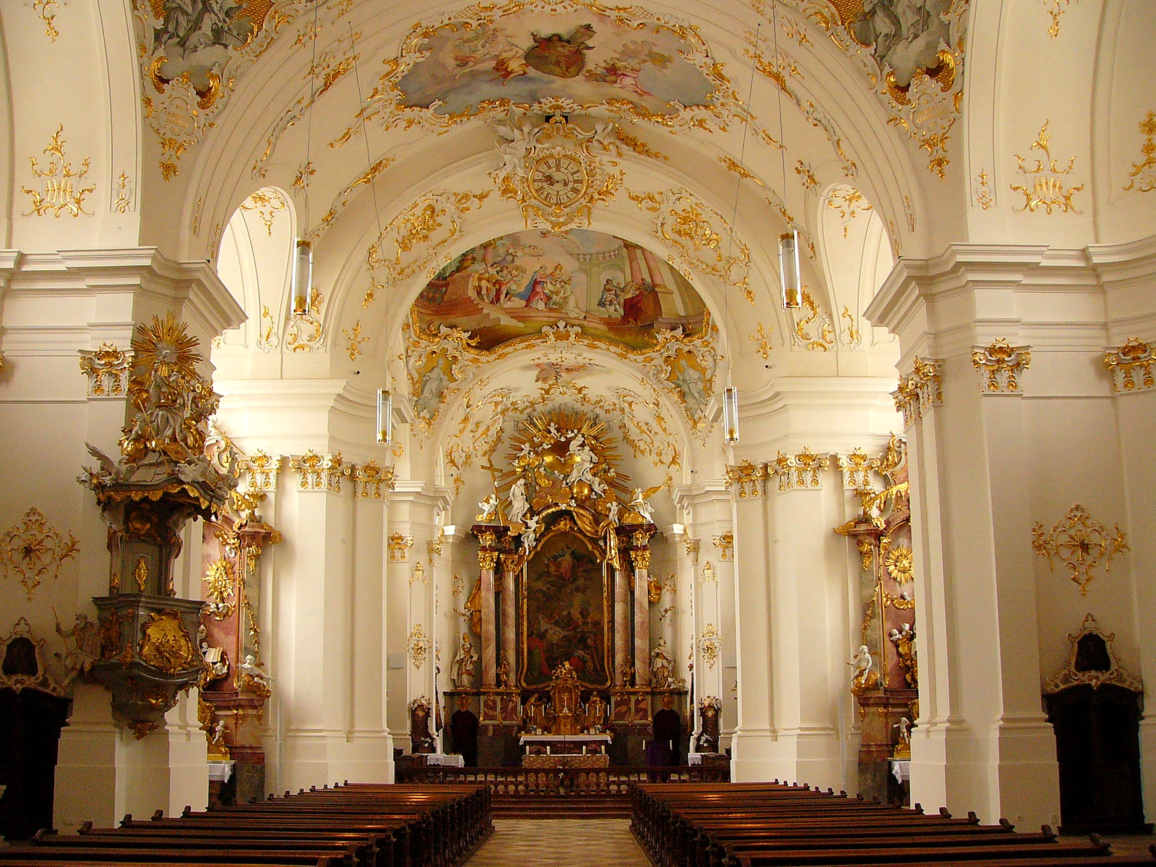 Klosterkirche St. Dionysius und Juliana; barocker Neubau ab 1733 von François de Cuvilliés d. Ä., fortgeführt ab 1751 von Johann Georg Gunetzrhainer und Johann Michael Fischer, Weihe 1760, Turm bereits 1710 errichtet, Ausstattung durch Johann Baptist Zimmermann, Johann Baptist Straub und Balthasar Albrecht. This is a photograph of an architectural monument.